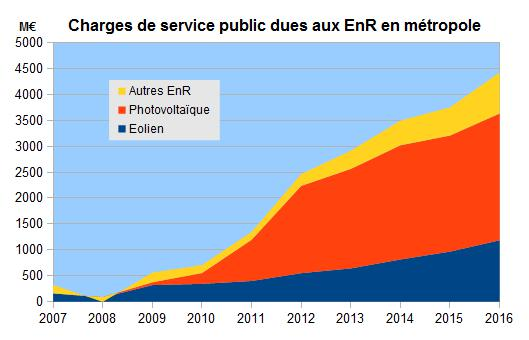 Charges de service public dues aux énergies renouvelables en métropole source données : CRE